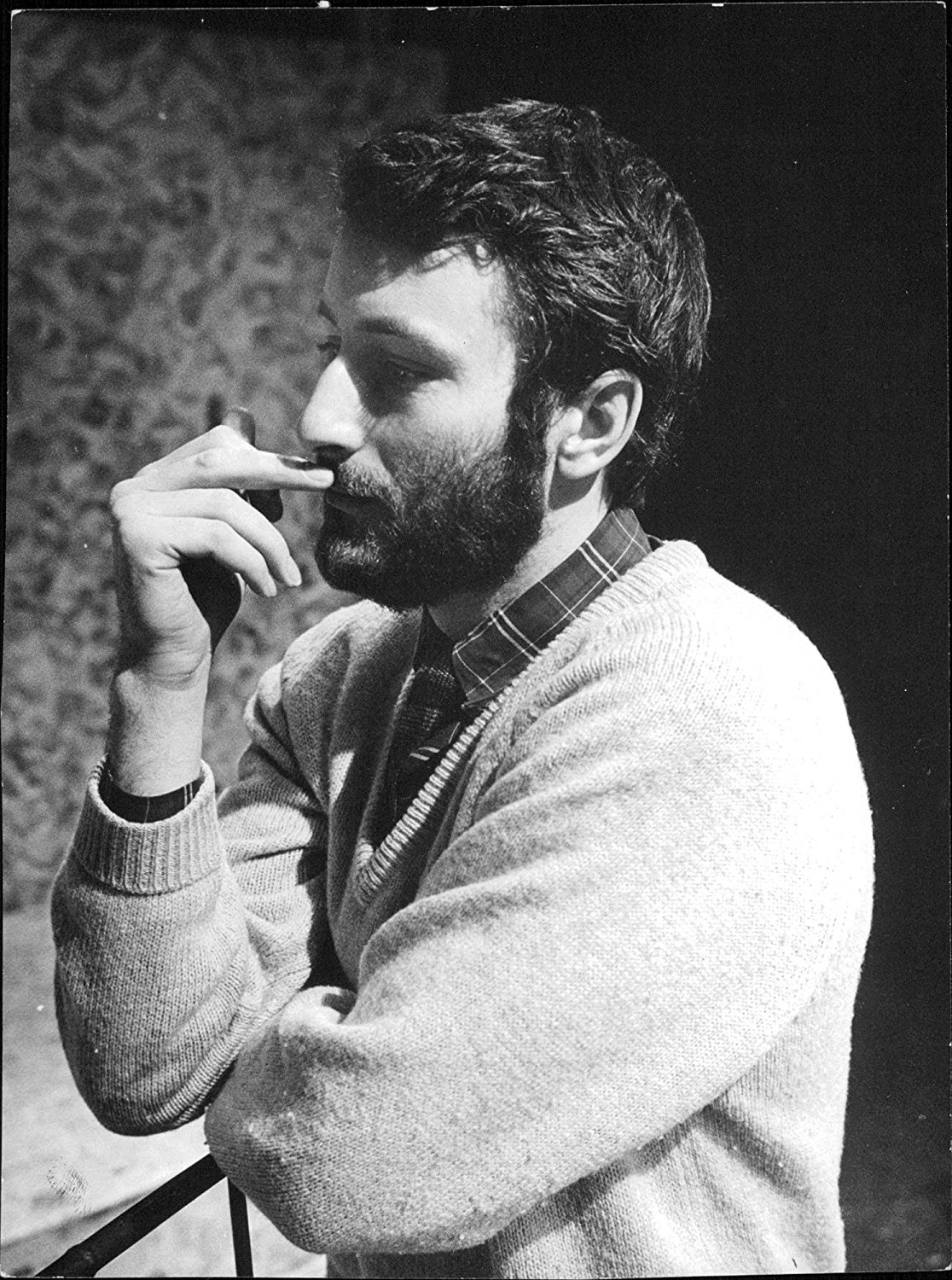 Johan Bergenstråhle. Införd i Svenska Dagbladet 1966-01-13 sid 14 (